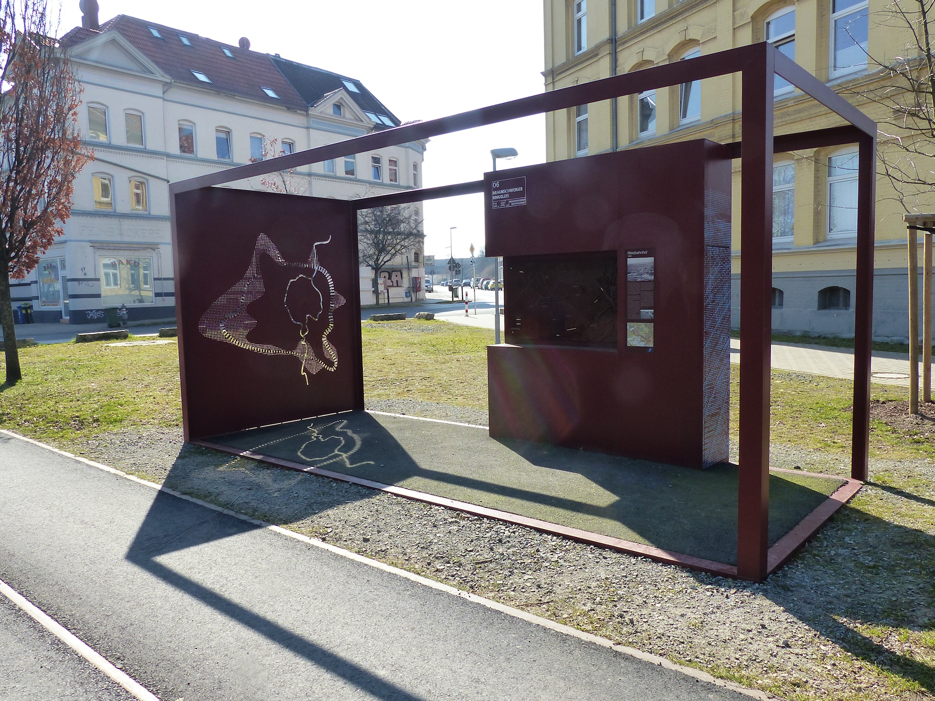 Container "Ringgleis/Westbahnhof", Blickrichtung Hugo-Lutter-Straße, März 2016